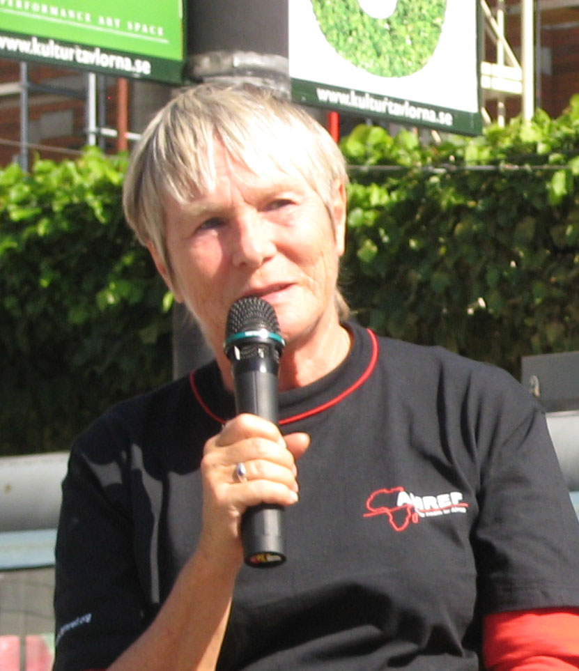 Kersti Adams-Ray intervjuar experter på sanitet. "Sanitation-is-dignity" utställningen på Norrmalmstorg, mellan den 18-20 augusti, 2008.